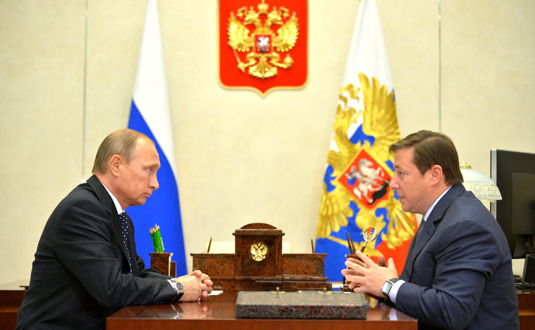 Встреча Президента России Владимира Путина с заместителем Председателя Правительства Александром Хлопониным